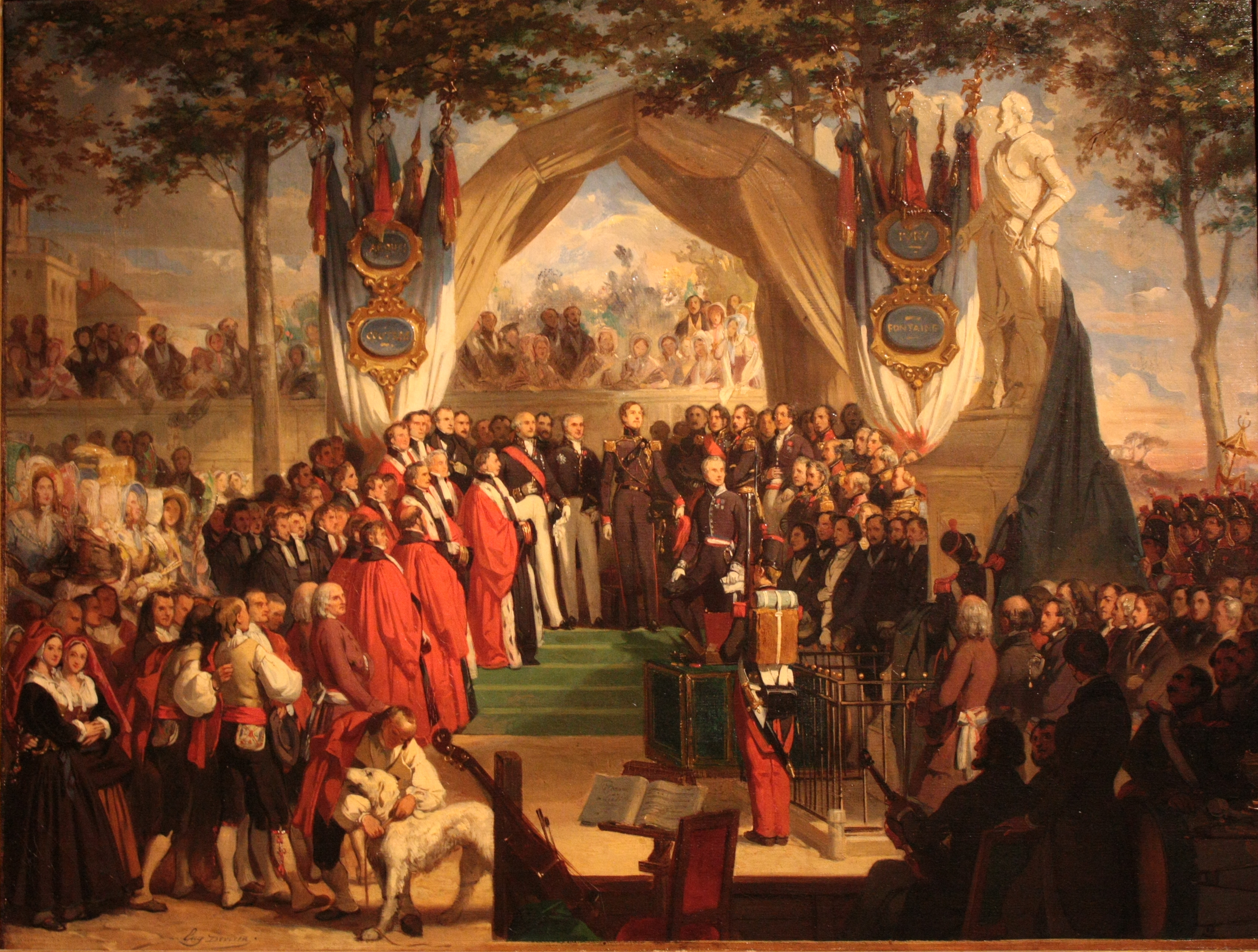 Inauguration de la statue de Henri IV sur la place Royale de Pau par S.A.R.Mgr le duc de Montpensier. (27 août 1843) par Eugène Devéria. Esquisse pour le grand tableau que l'on trouve à Versailles.